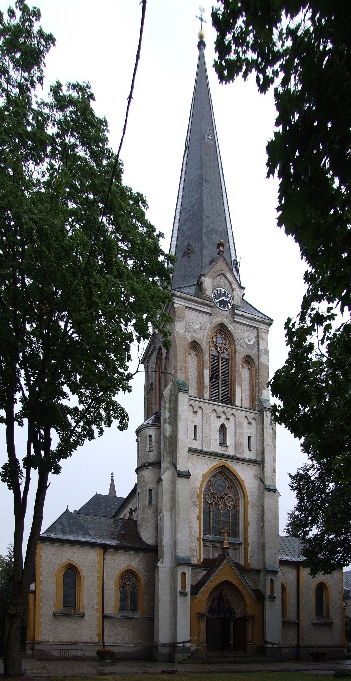 Kościół św. Franciszka w Borkach Wielkich